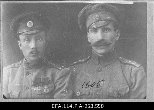 1. Eesti polgu II pataljoni ülem staabikapten Anton Irv (vasakul) ja I pataljoni ülem staabikapten Karl Parts 1918. aastal.